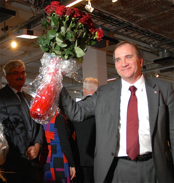 Stefan Löfven väljs till partiordförande på socialdemokraternas partistyrelse i Stockholm den 27 januari 2012.